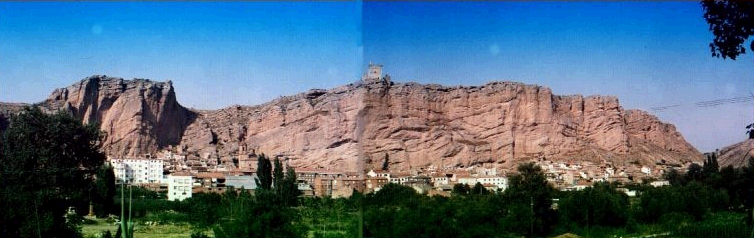 Quel visto desde la ermita.